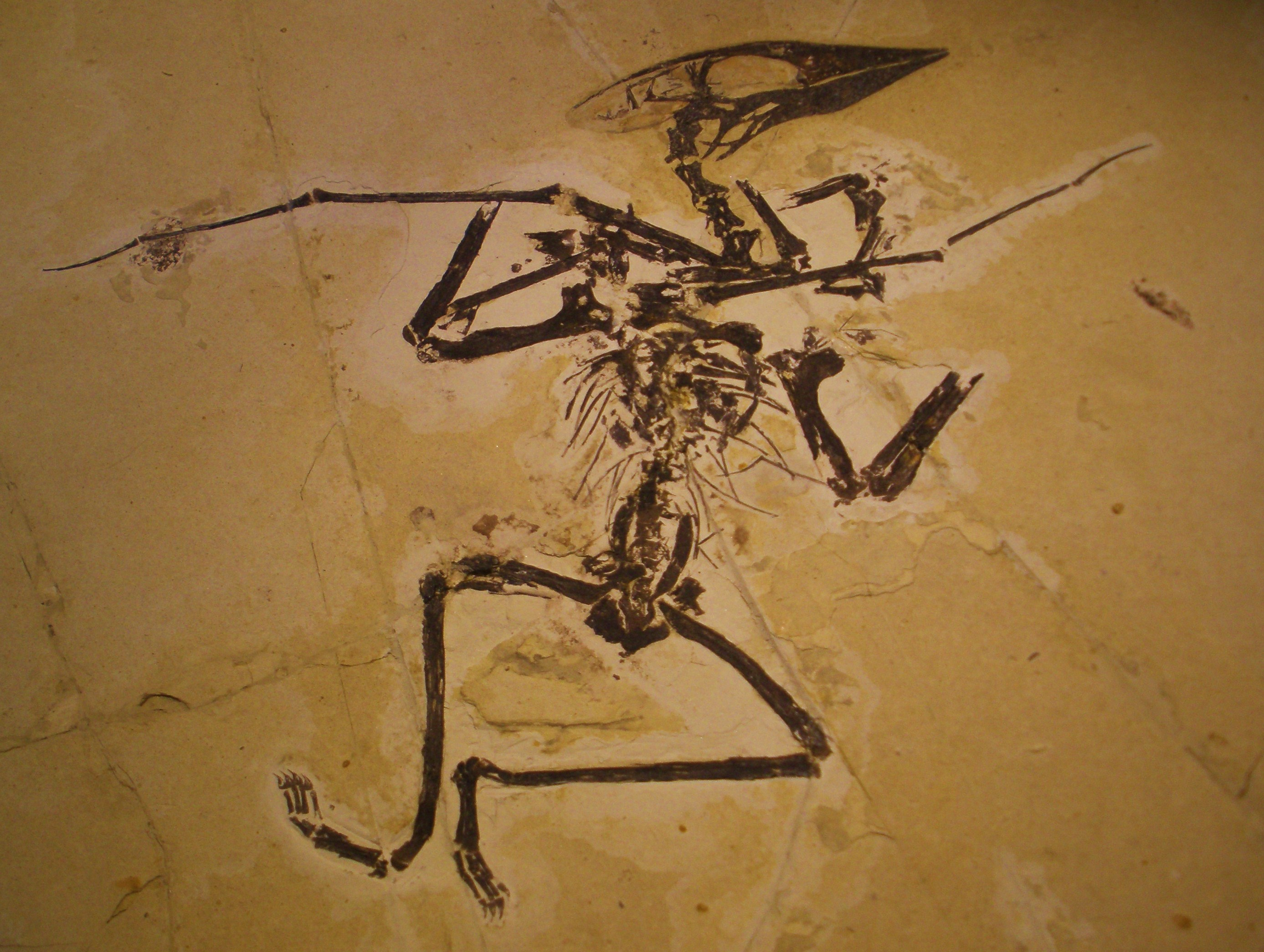 fossil Sinopterus